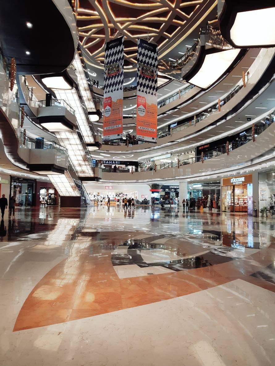 Tampak dalam Lippo Mall Kemang